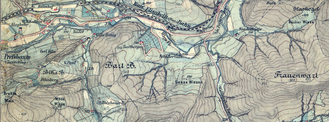 historische Landkarte: Gradkartenblatt Zone 13 Colonne XIV Section b3 (später 4756/2c). Pressbaum, Wolfsgraben, Breitenfurt, Hochrotherd, Laab im Walde im Wienerwald, Niederösterreich. Franzisco-josephinische (3.) Landesaufnahme der österreichisch-ungarischen Monarchie. Aufnahmeblatt 1:12.500. Aufgenommen 1872 Ausschnitt: Pressbaum